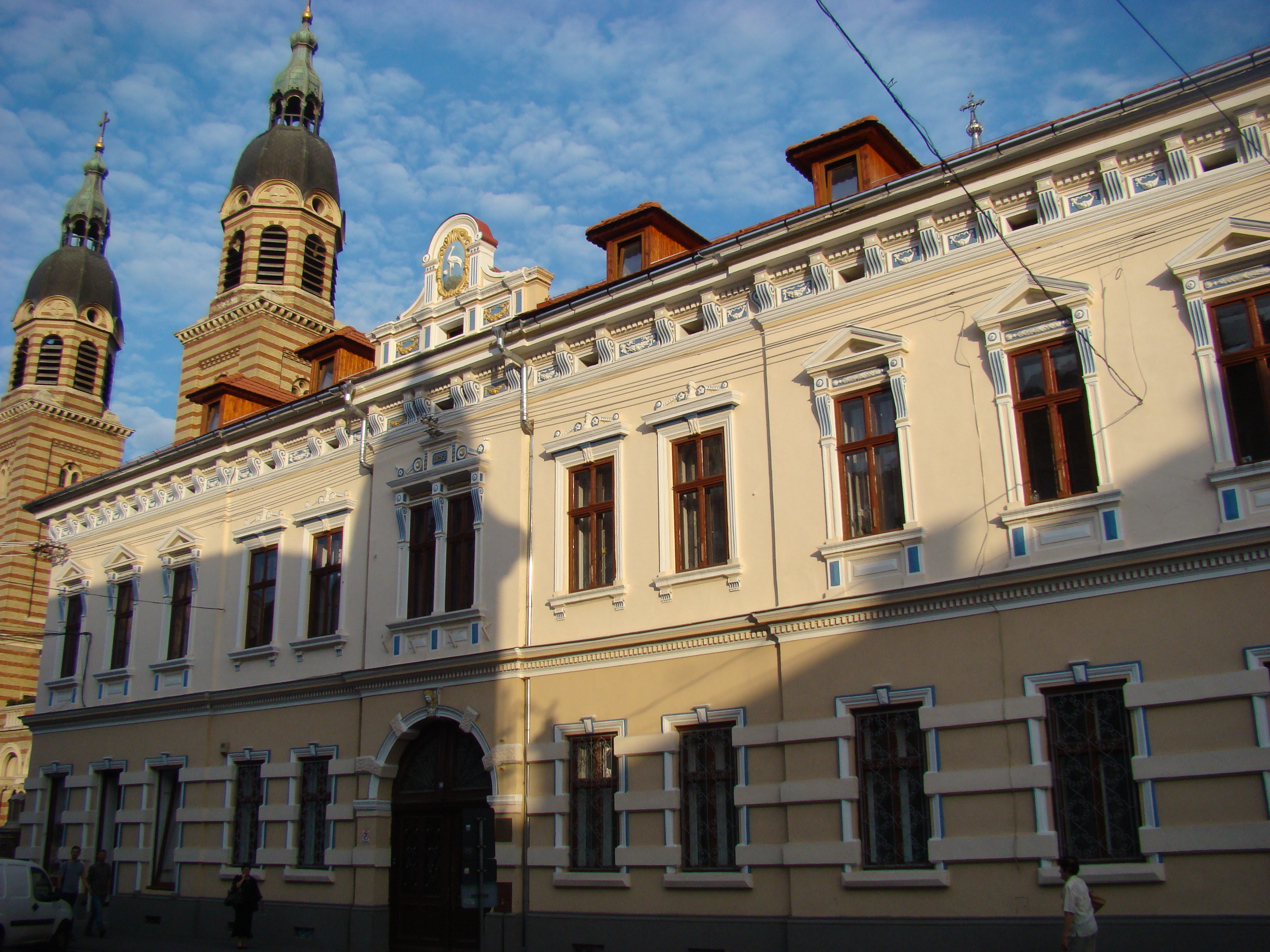 Arhiepiscopia Sibiului și Catedrala ortodoxă „Sfânta Treime”